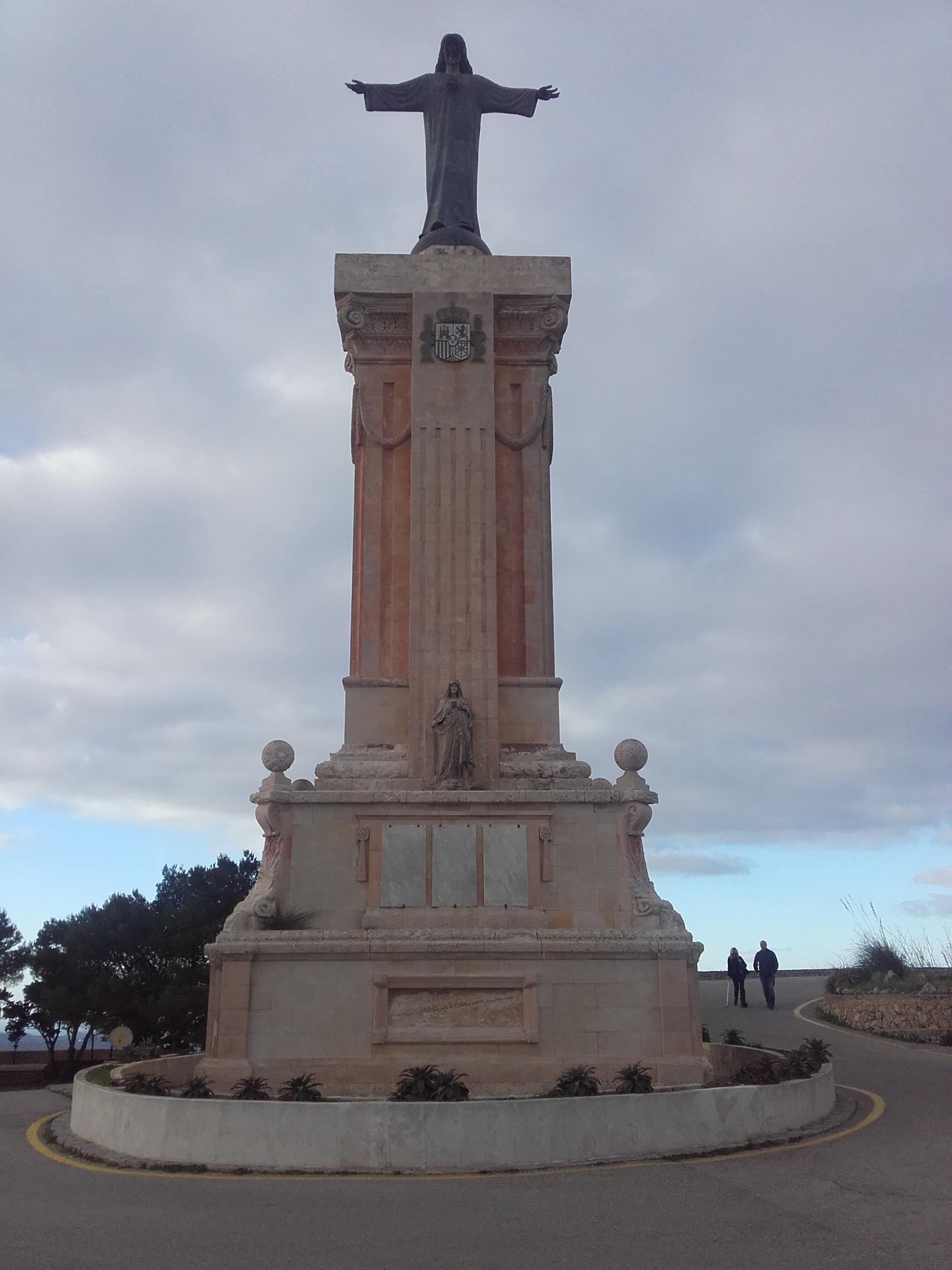 Monumento en la Iglesia de El Toro, Menorca, Islas Baleares, (España)